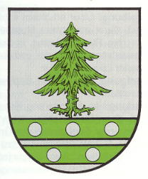 Wappen von Dennweiler-Frohnbach